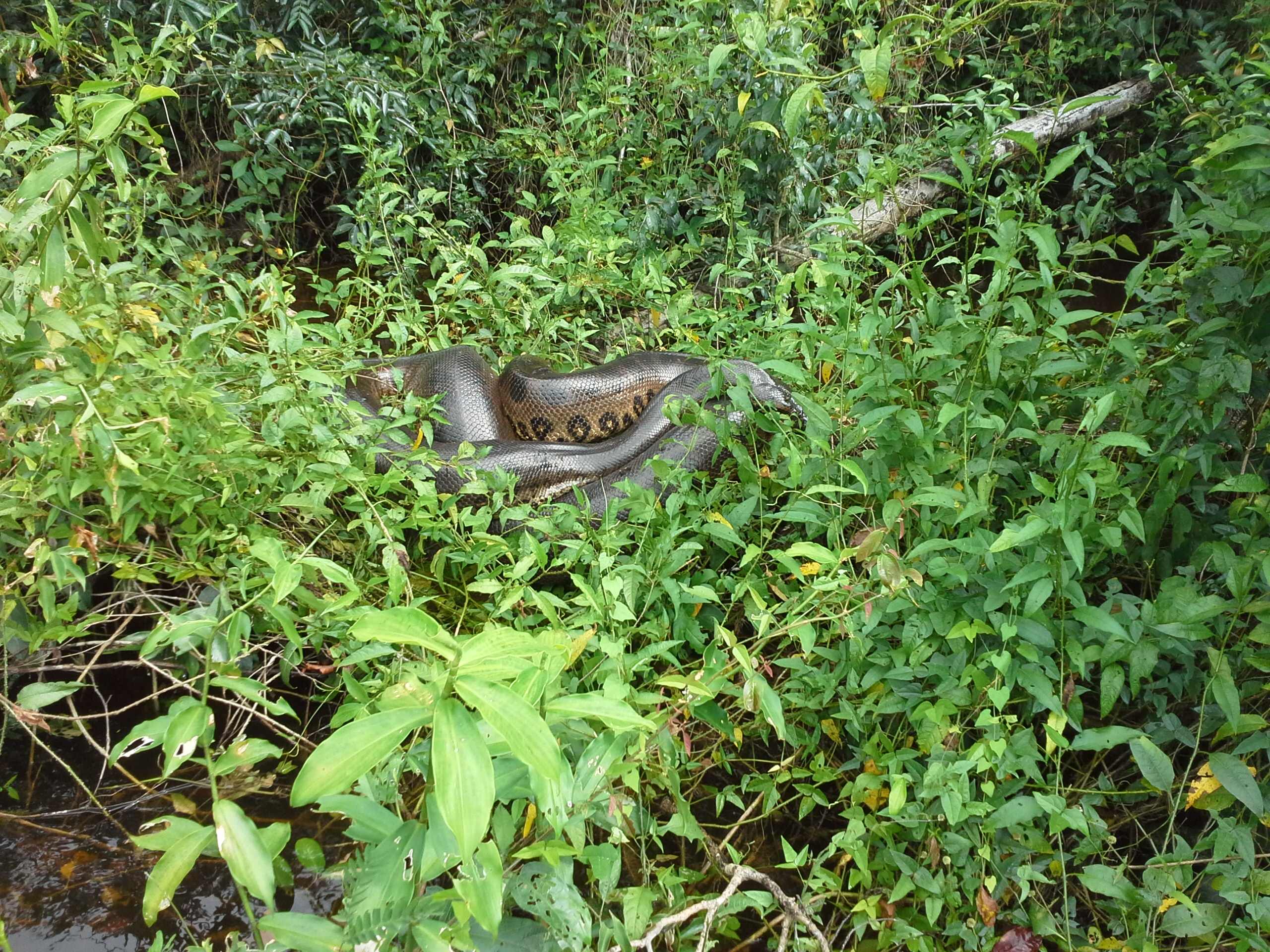 Sucuri-verde da Amazônia, aproximadamente 6 metros, foto tirada na Resex Rio Ouro Preto, Guajará-Mirim, Rondônia.